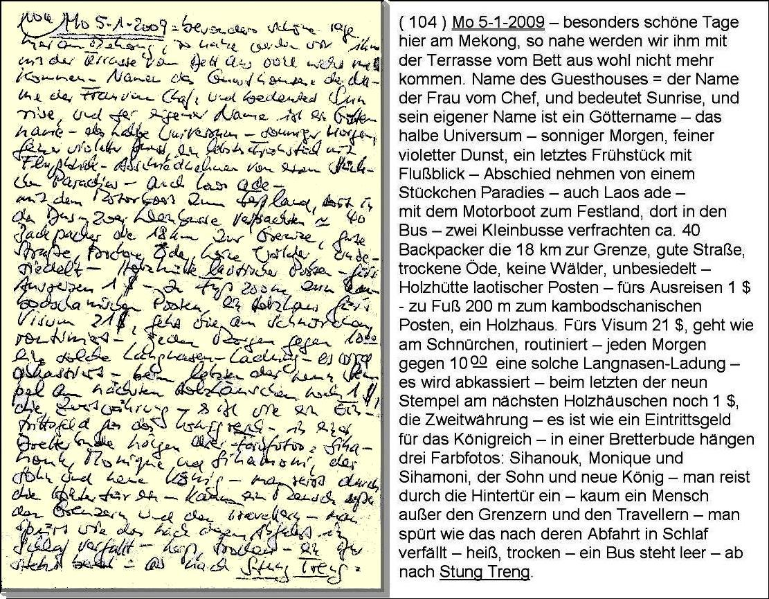 Die vorletzte Seite im letzten Tagebuch von Rüdiger Siebert